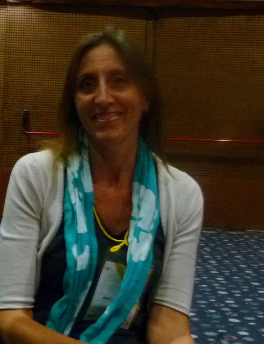 Mónica Bertolino